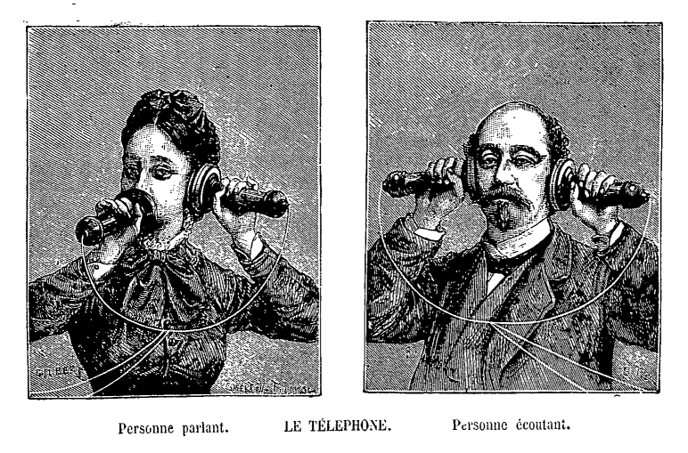 Illustration of an early telephone set from Principales découvertes et inventions dans les sciences, les arts et l'industrie (1880) by French journalist and encyclopedist Adolphe Bitard (1826-19??)